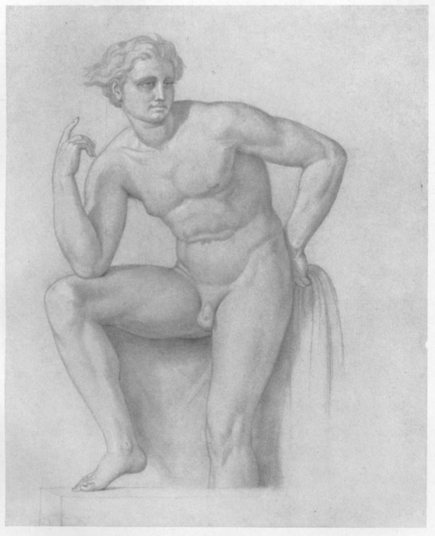 Aktstudie (Beschreibung lt. Quelle)